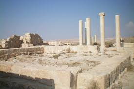 قلعة مكاور مادبا